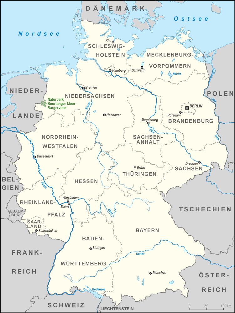 Karte des Naturparks Bourtanger Moor-Bargerveen in Deutschland und der Niederlande